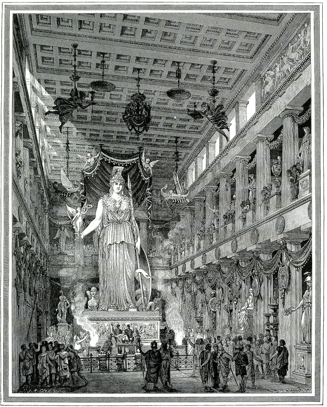 Ιάκωβος Φάλκε. Ελλάς, ο Βίος των Αρχαίων Ελλήνων. Κατά το γερμανικό του Ιακώβου Φάλκε, Ν. Γ. Πολίτης (μετ.), Αθήνα, Κάρολος Βίλμπεργκ, 1887